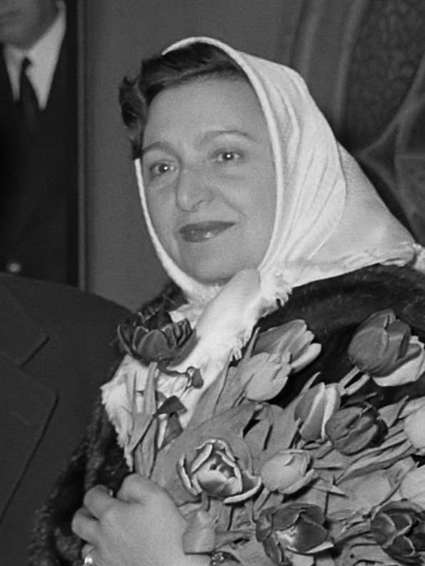 Franse actrice Marie Bell aankomst Amsterdam 20 maart 1956